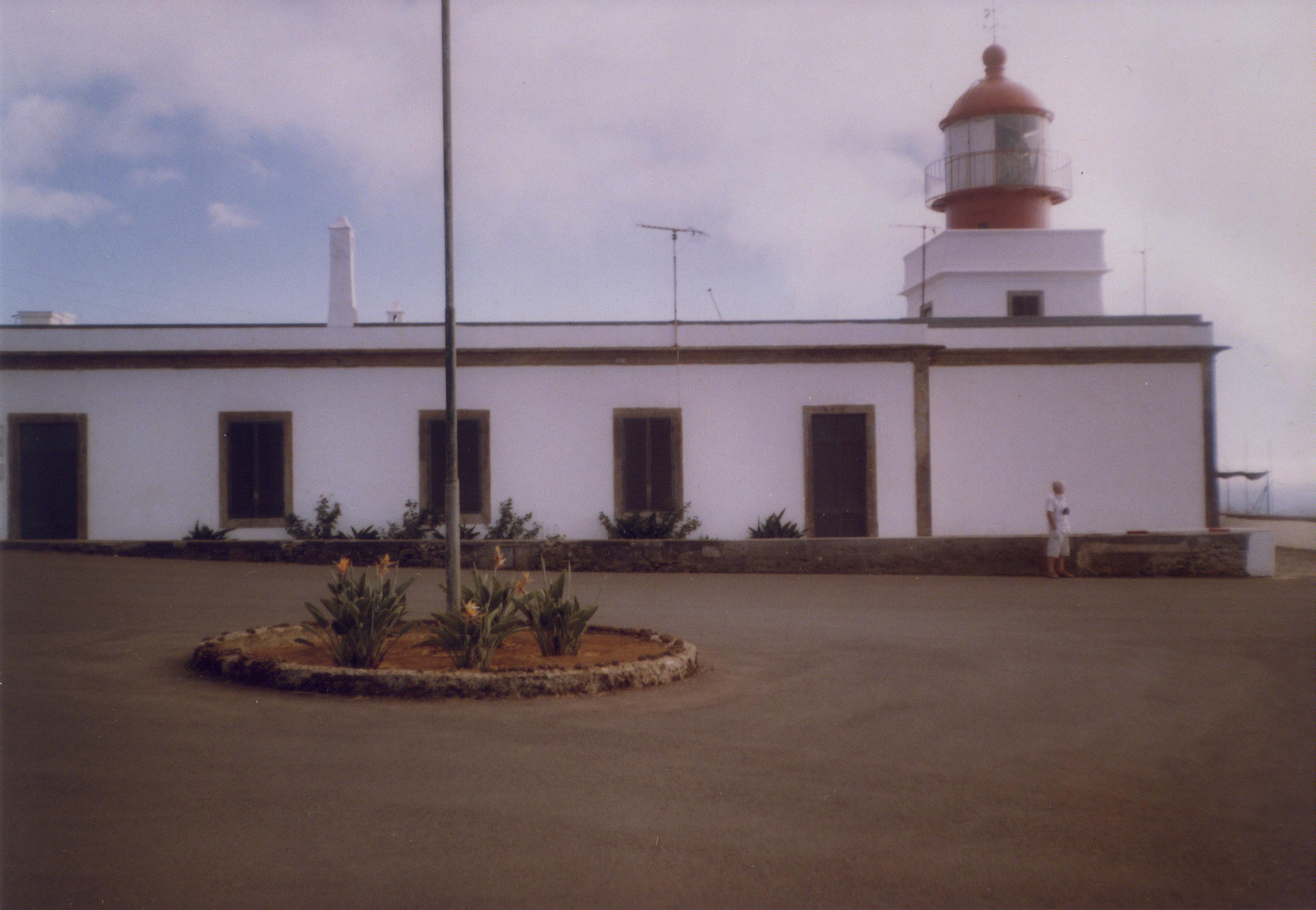 Lighthouse at Ponta do Pargo - Madeira